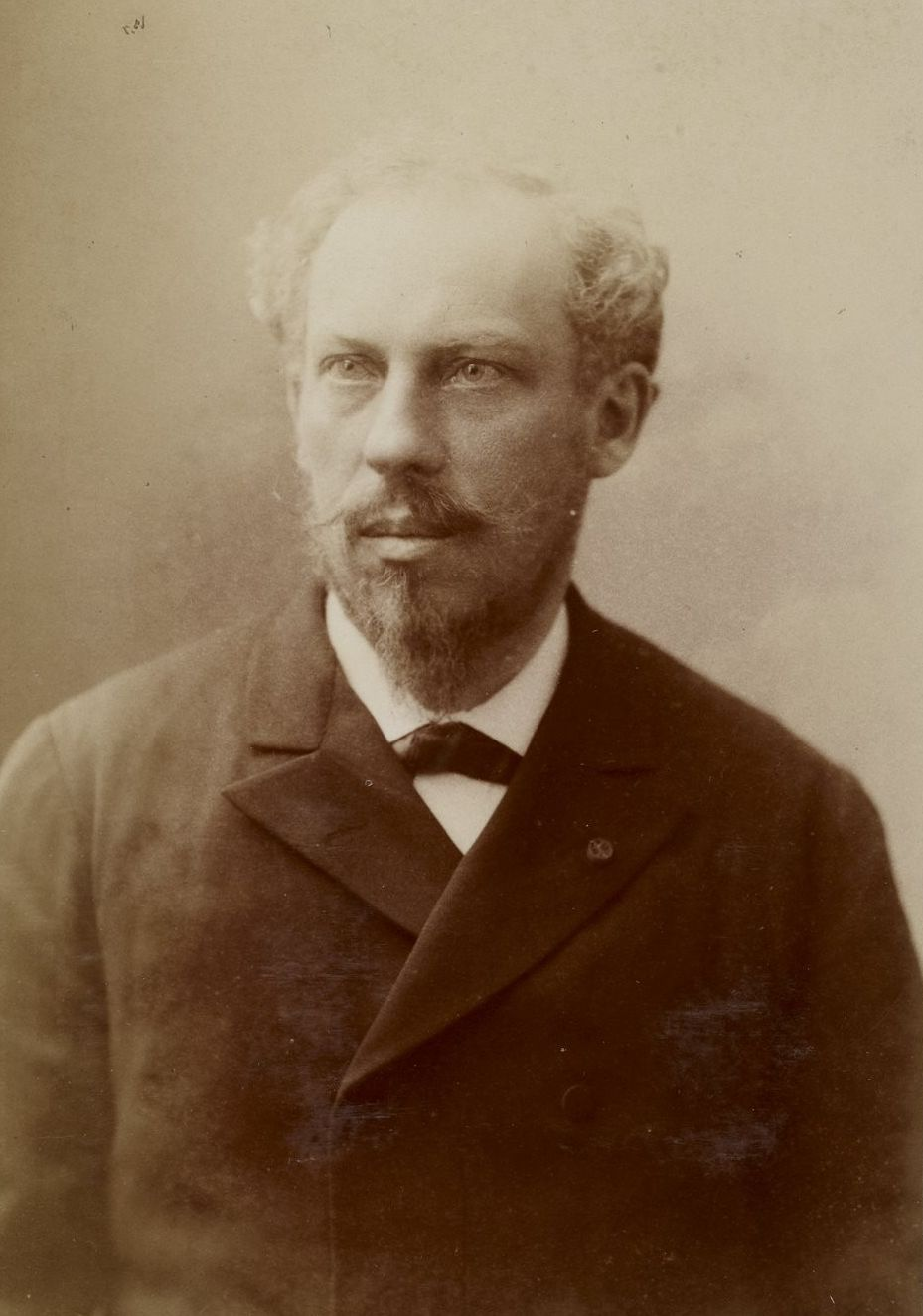 Chrétien Édouard Caspari par Eugène Pirou